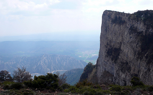 pic del coscollet, a prop d'oliana